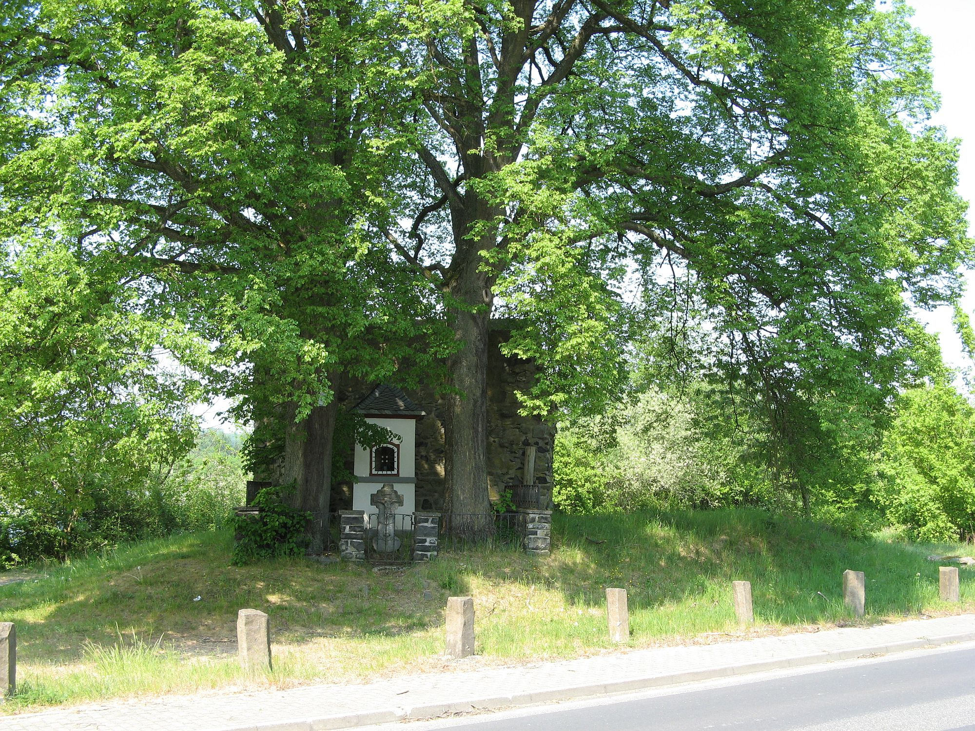 Reste der Liebfrauenkirche am Seeweier bei Mengerskirchen